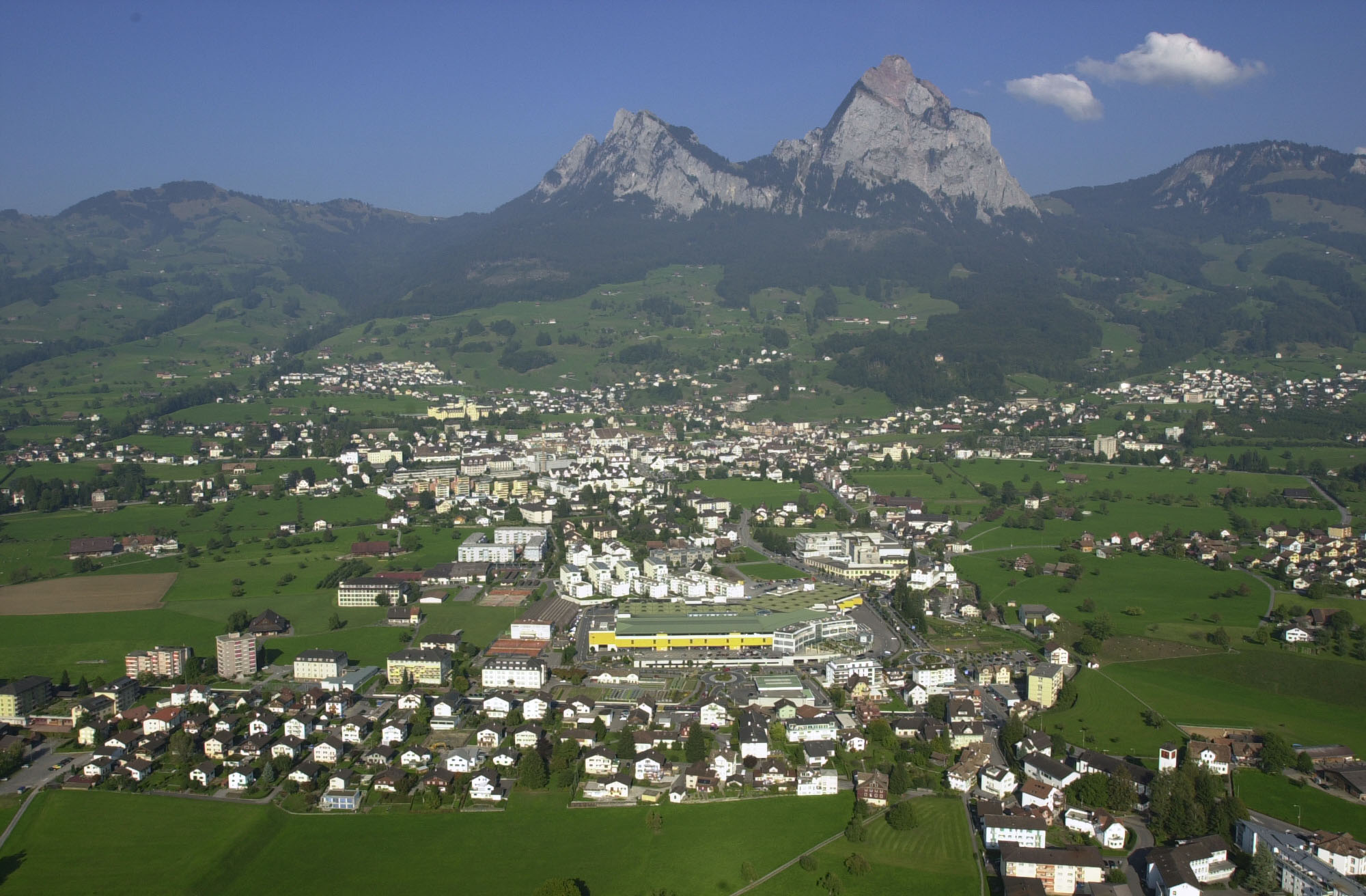 Luftaufnahme von Schwyz und Ibach mit den beiden Mythen